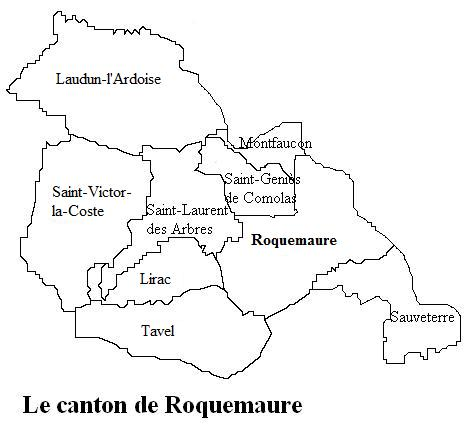 Carte des communes du canton de Roquemaure (Gard)